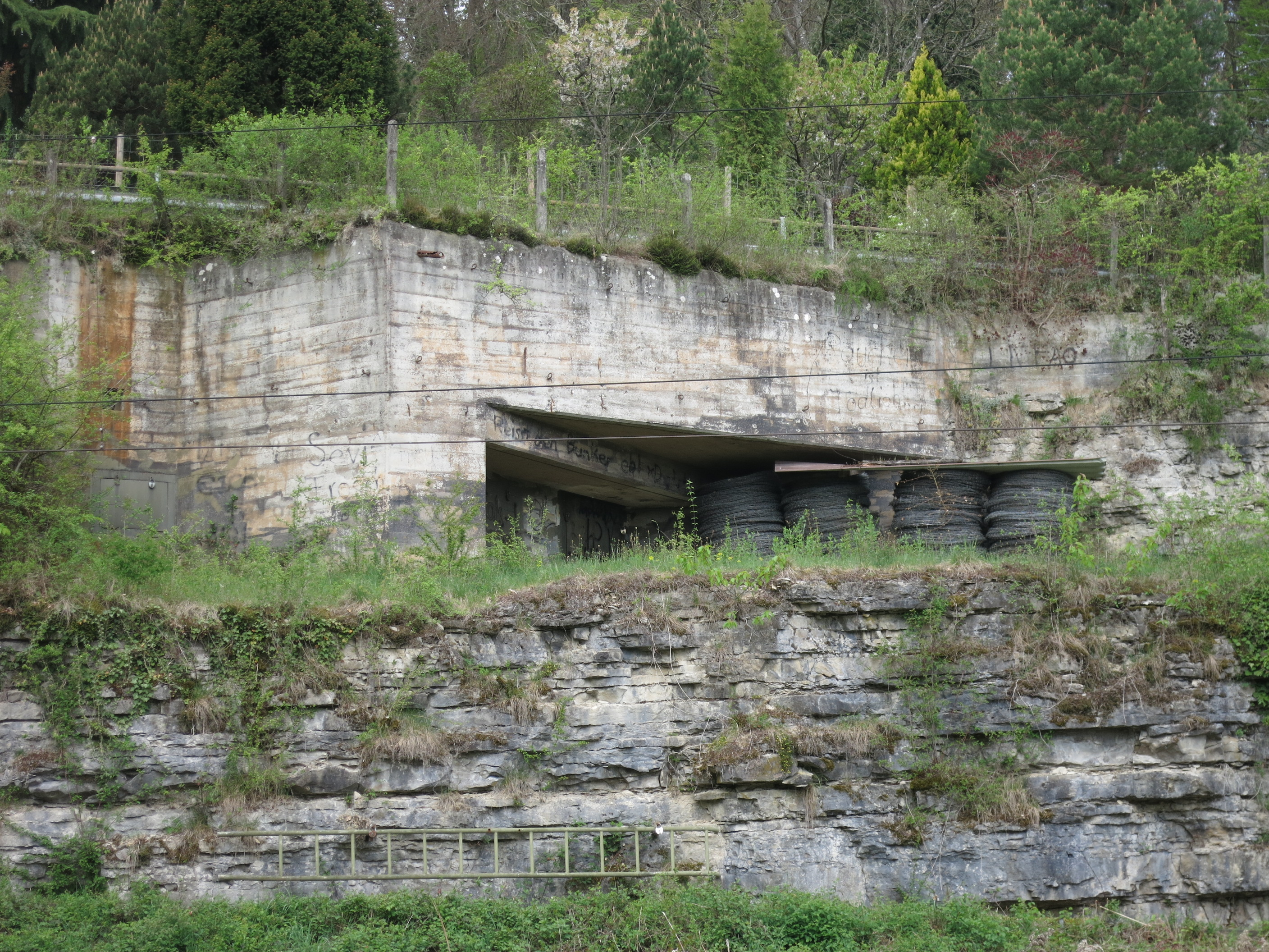 Sperrstelle Koblenz AG, Schweiz